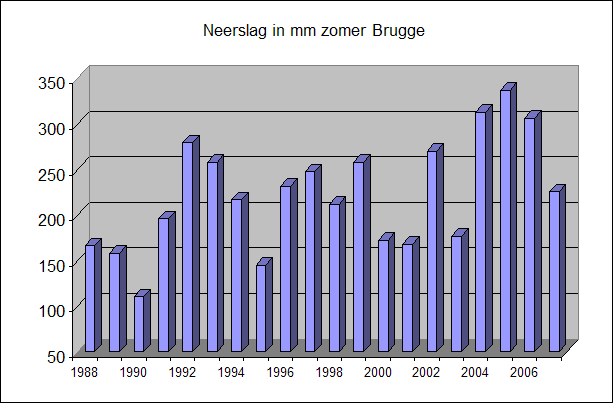 Neerslag Brugge